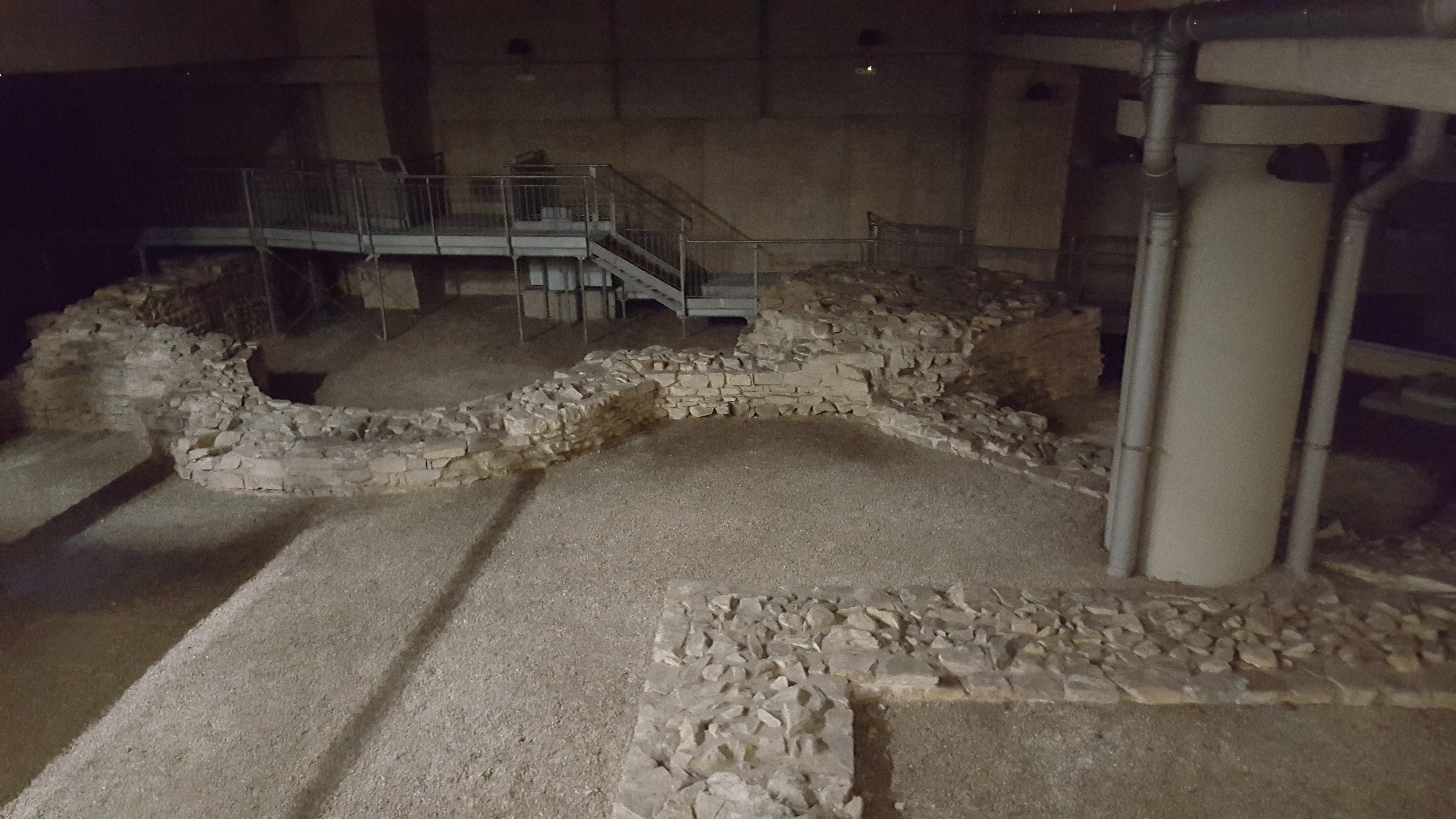 Развалины древнеримского термального комплекса 1-3 века нашей эры в городе Комо, Италия